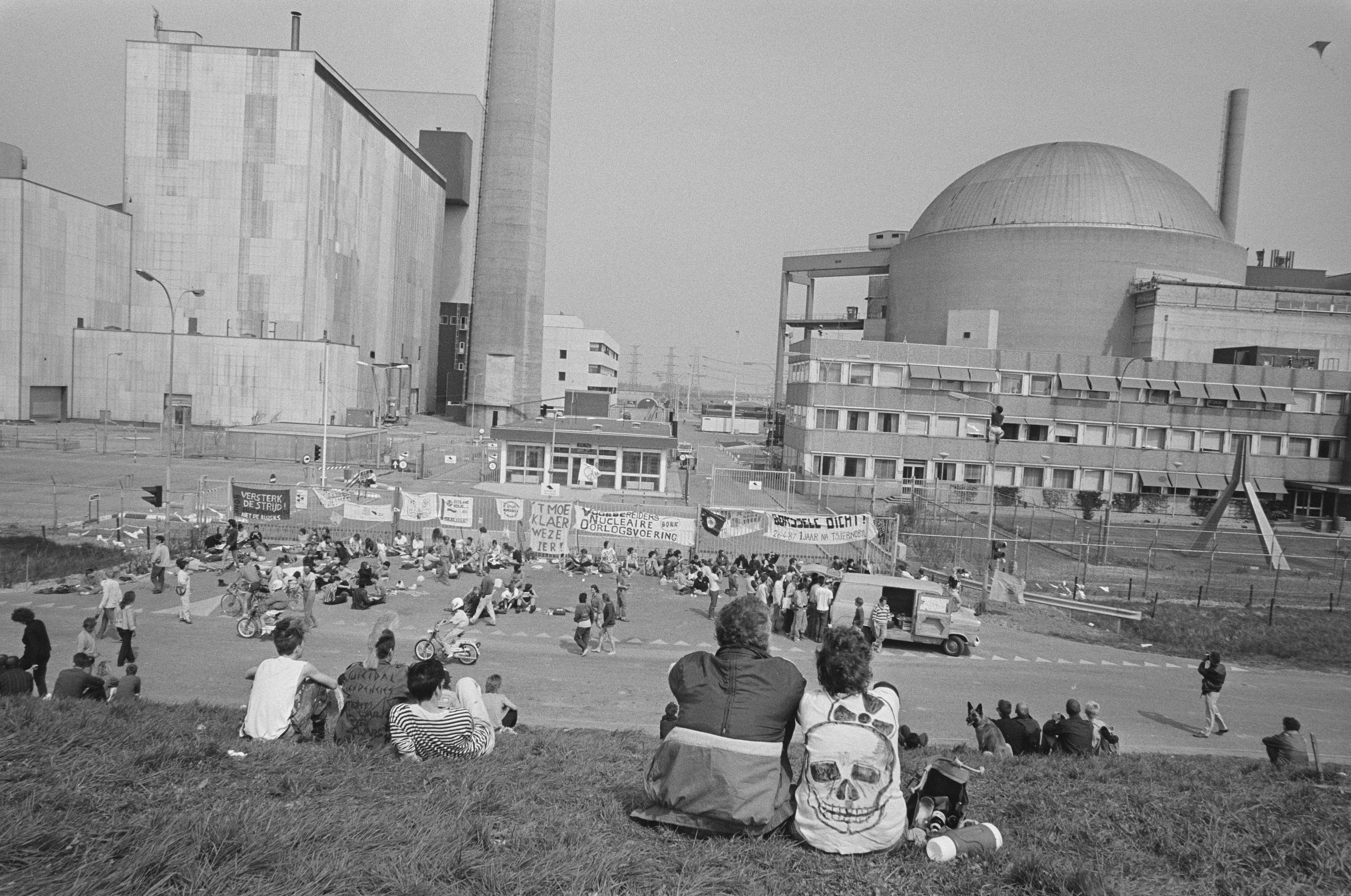 Blockade der Kernkraftwerk Borssele.